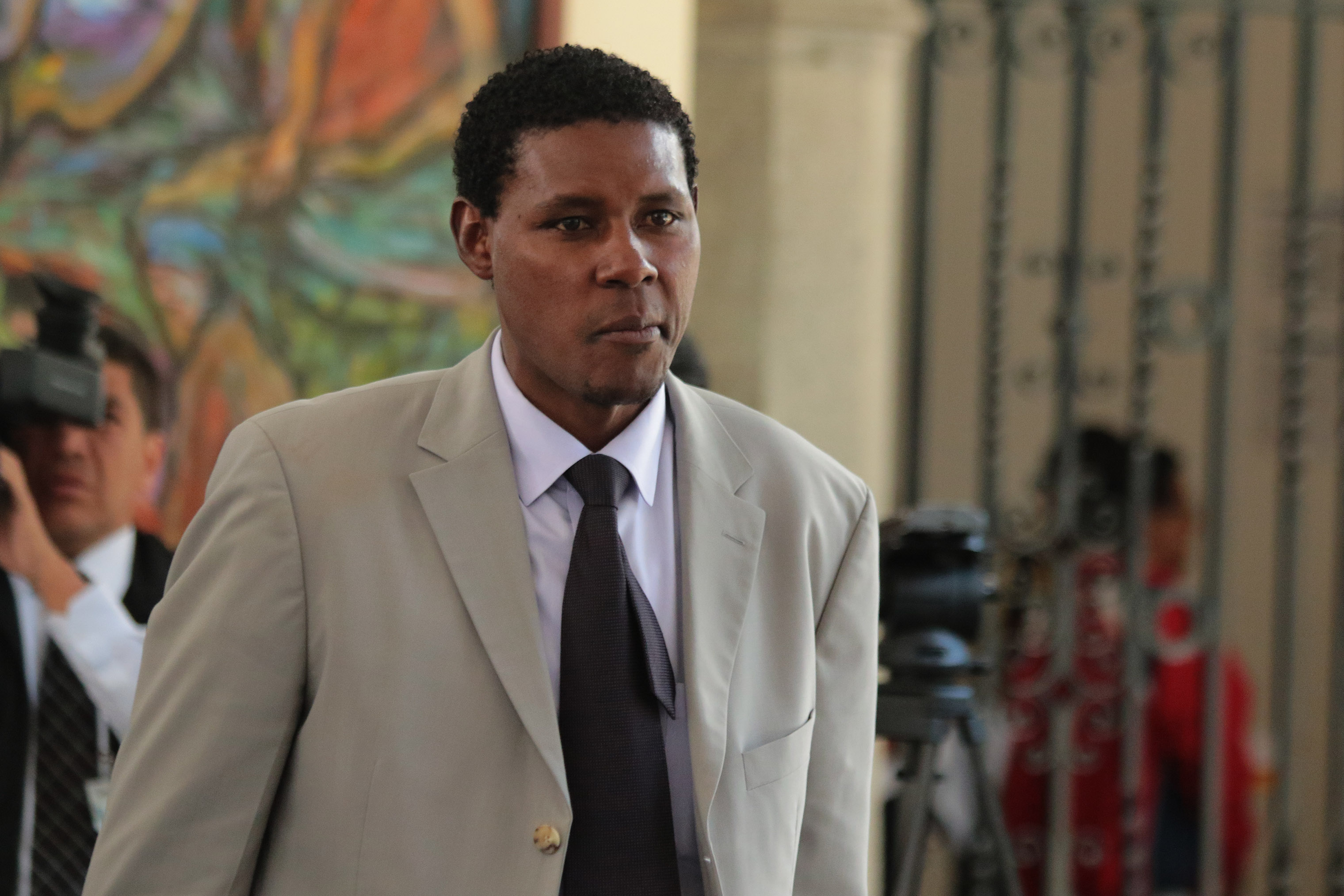 Agustin Delgado Chala (1973-) Asambleista por PAIS y ex jugador de la Selección Ecuatoriana de Fútbol. Almuerzo en la casa presidencial con comunidades afrodescendientes de todo el pais, el presidente Rafael Correa estuvo presente junto al vicepresidente Jorge Glas. Fotografías: Carlos Rodríguez/Andes.